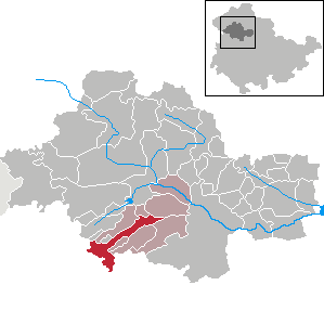 Mülverstedt in Thuringia - Unstrut-Hainich-Kreis